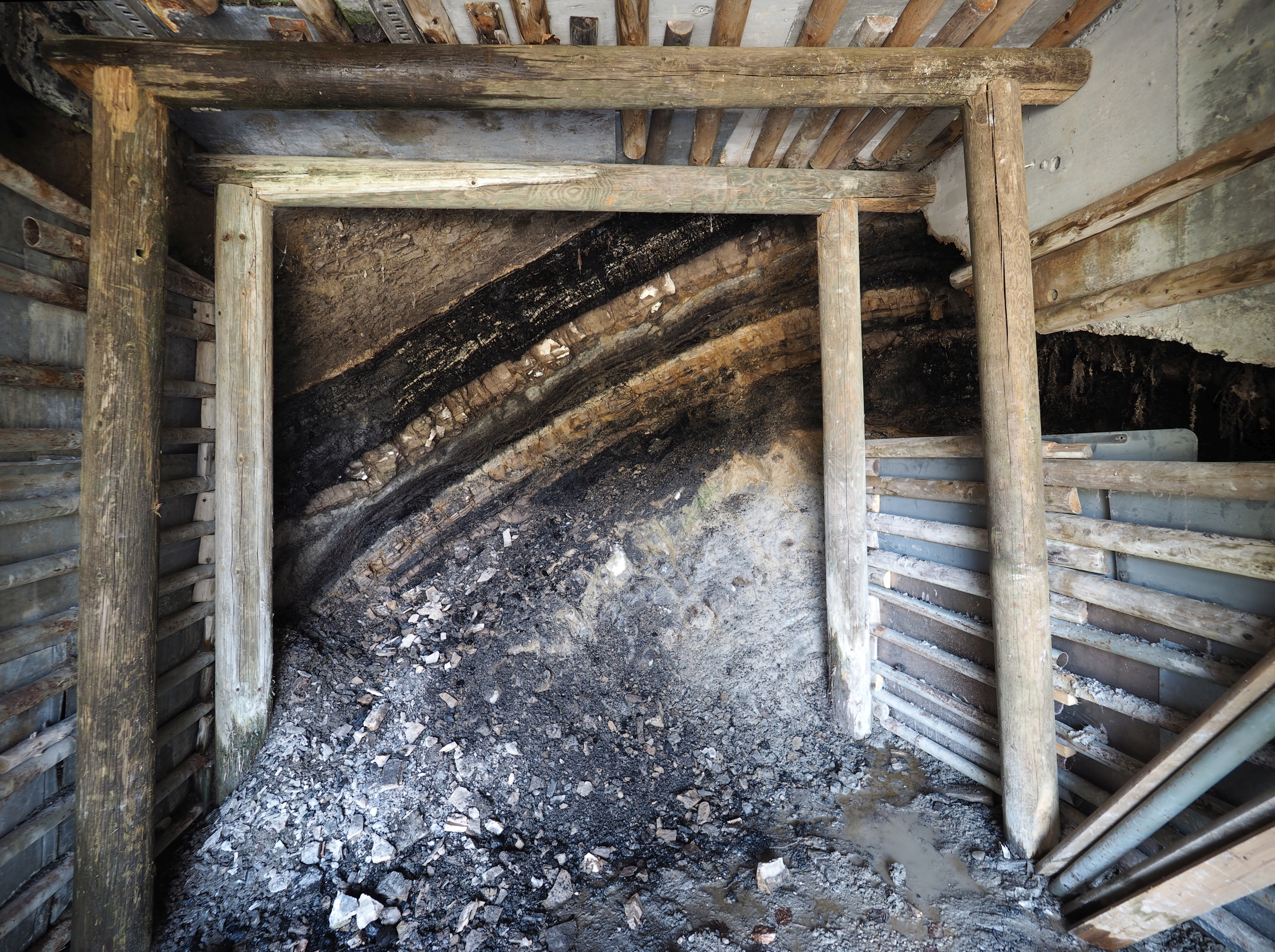 Kohleflöz am Bühlach (Geotop Peitinger Pechkohle)